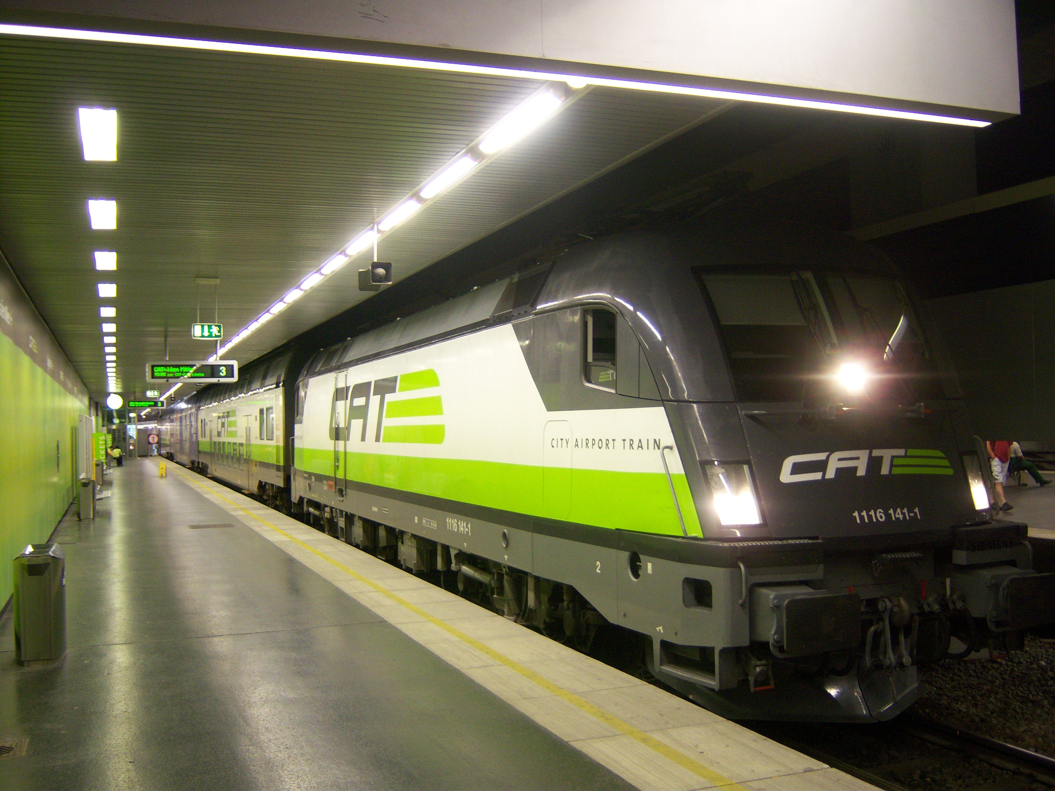 CAT-Zug im Bahnhof Flughafen Wien